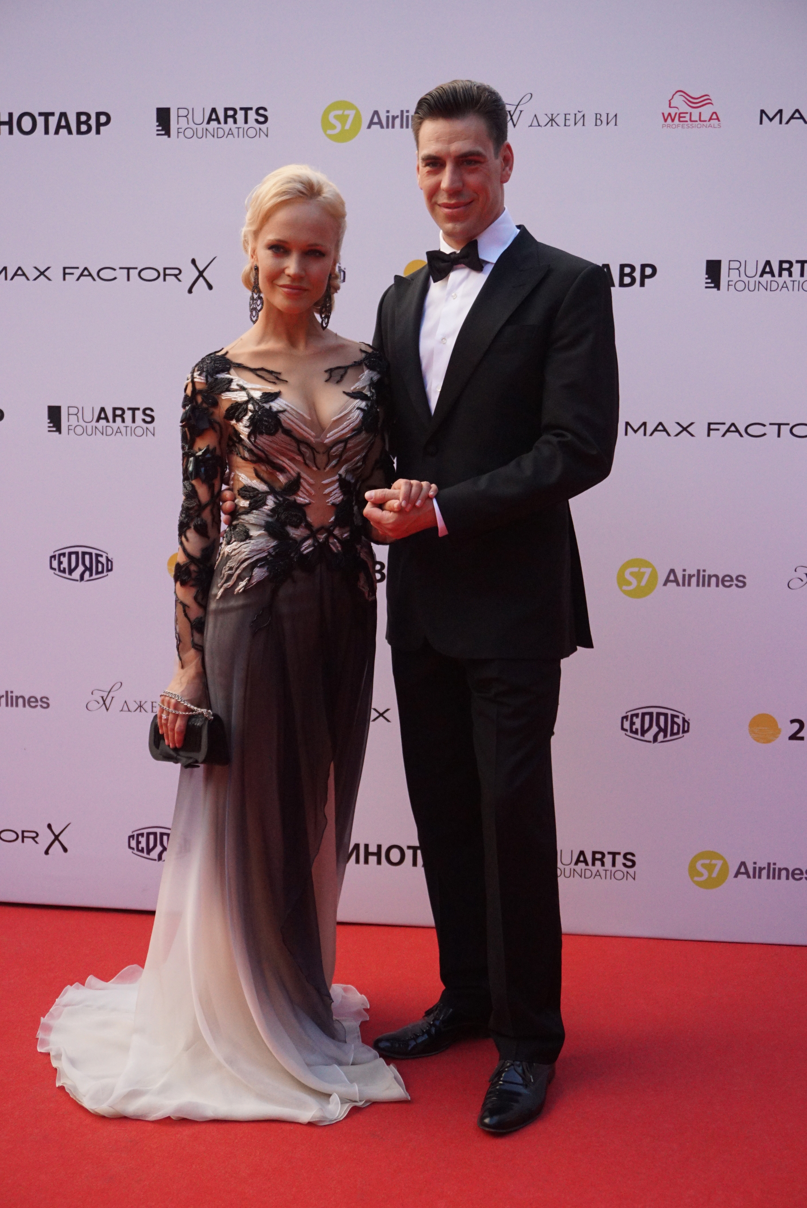 Дми́трий Петро́вич Дю́жев (род. 9 июля 1978, Астрахань) — российский актёр театра и кино, кинорежиссёр с супругой Татьяной. Кинотавр, Сочи - 2016